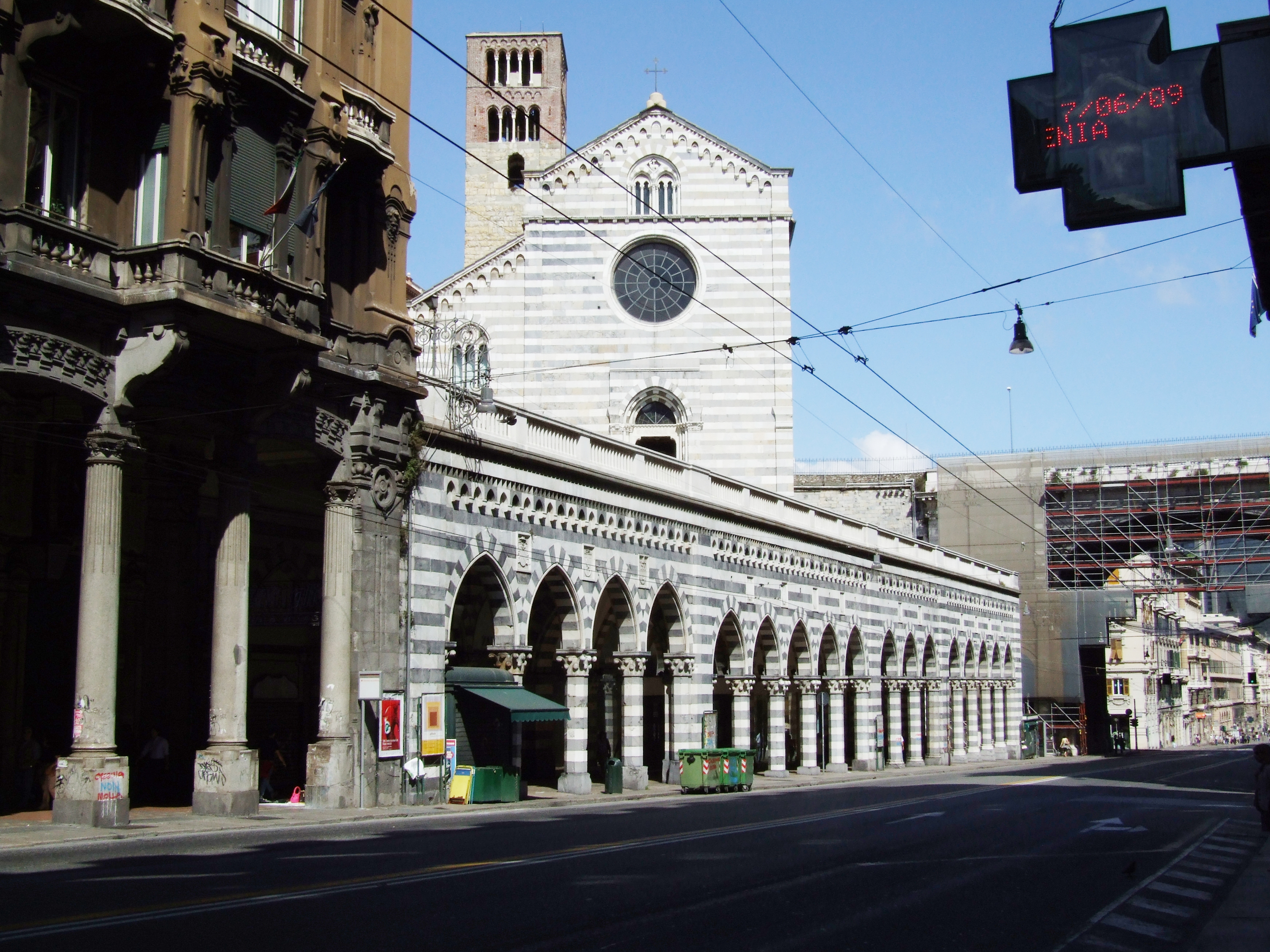 Genoa